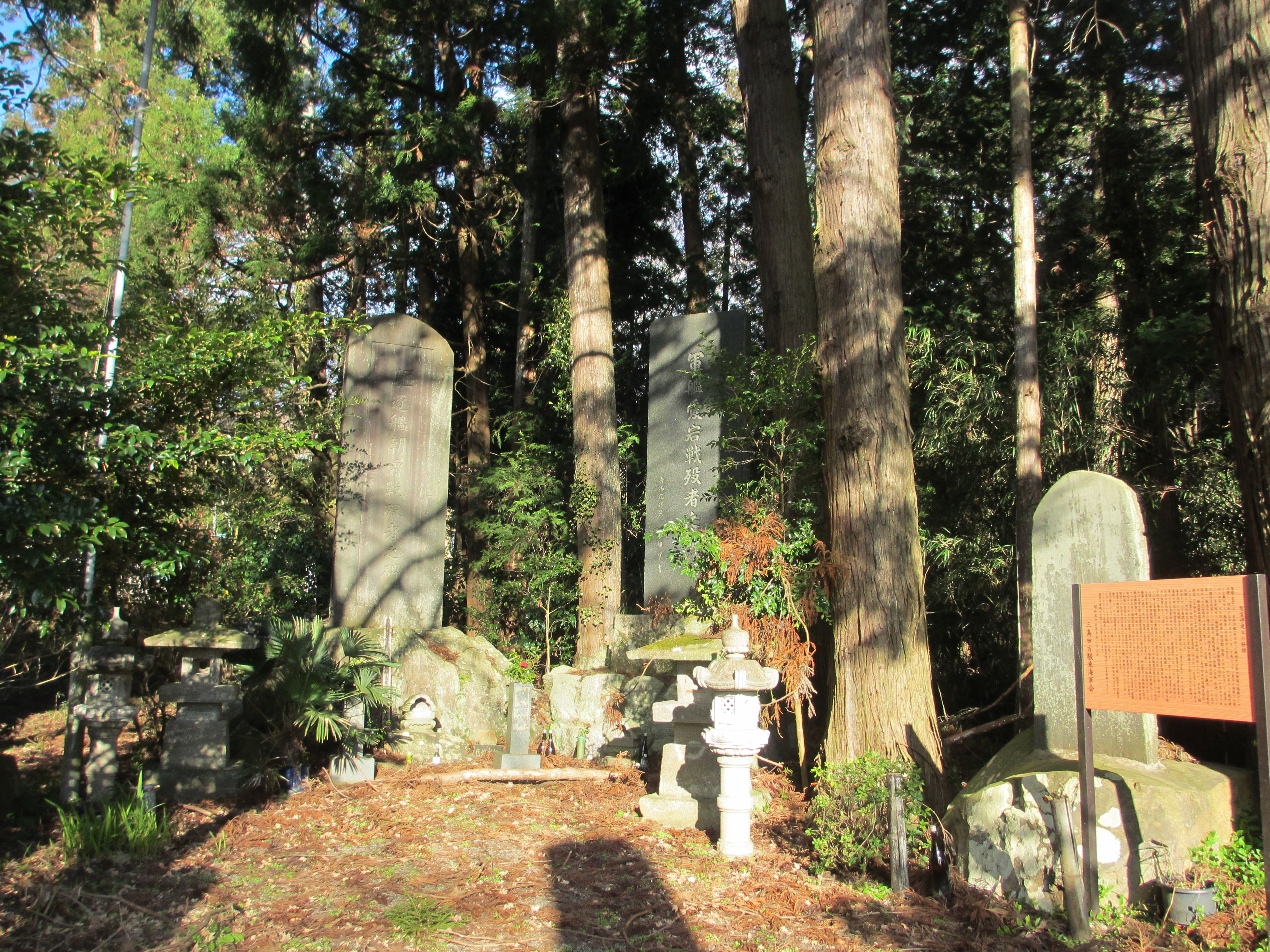 静岡県三島市玉沢1妙法華寺境内